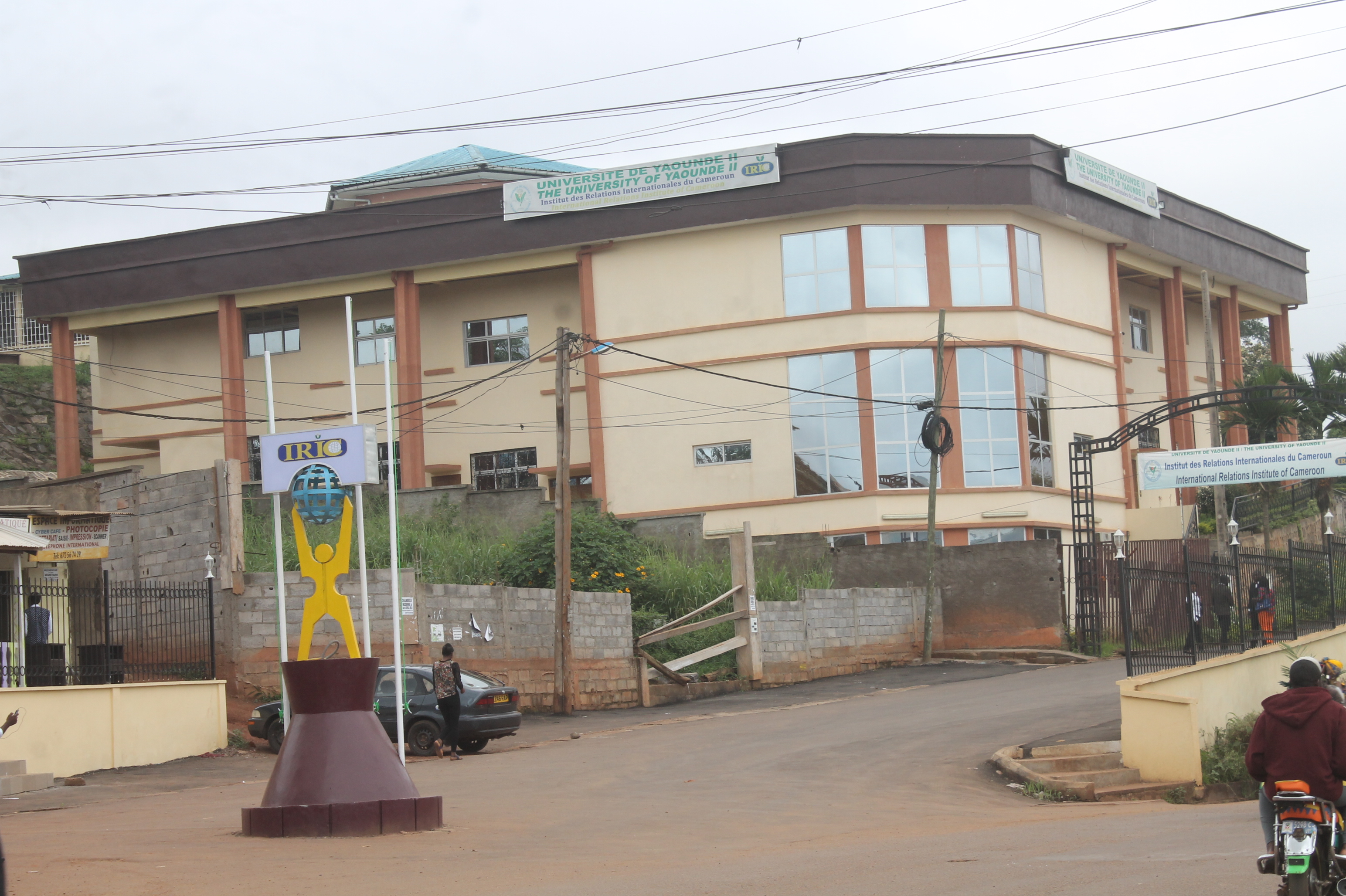 Entrée du site de l'Institut des Relations Internationales du Cameroun (IRIC), Obili.